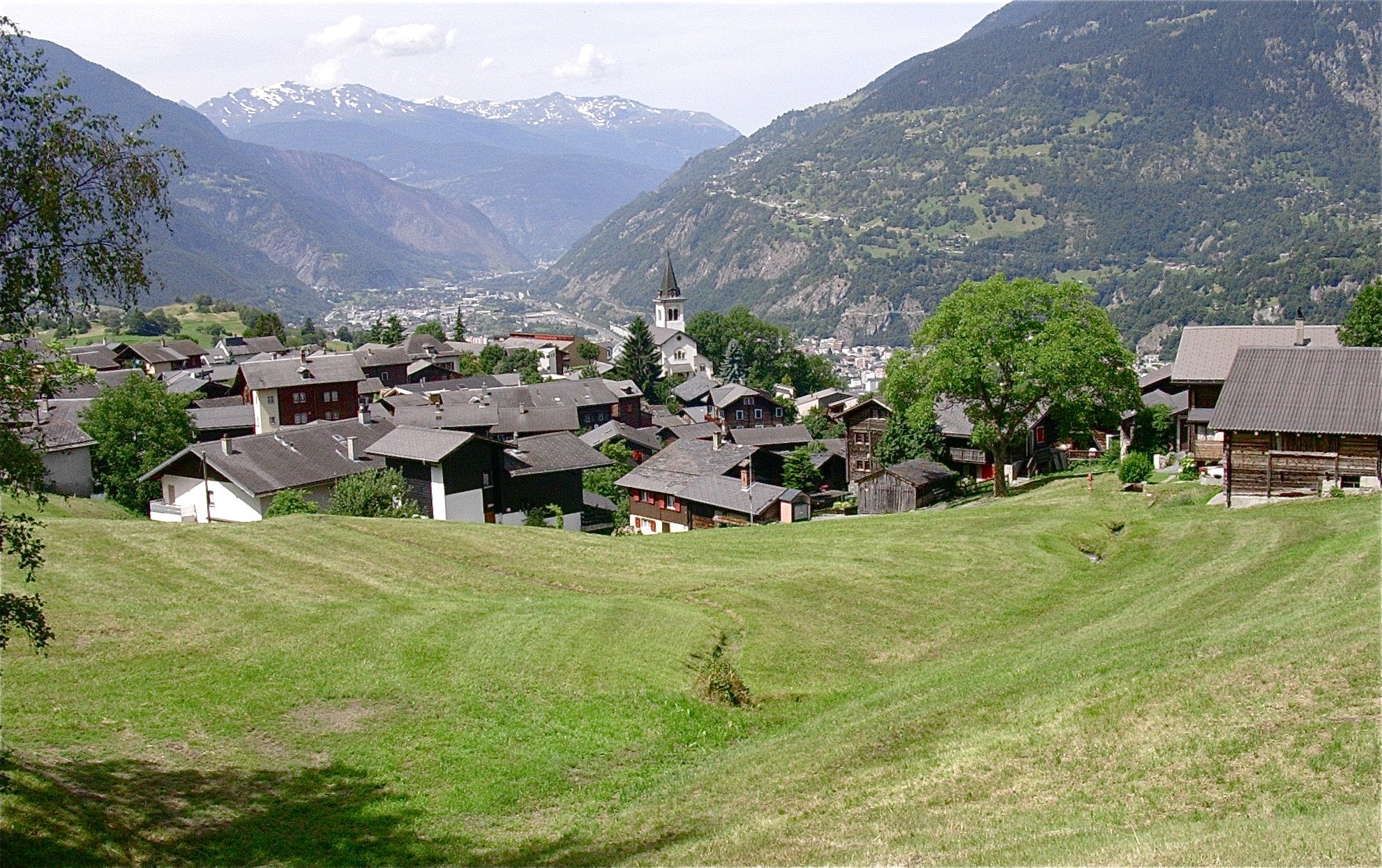 Petit village au dessus de la ville de Brigue, sur la route du col du Simplon